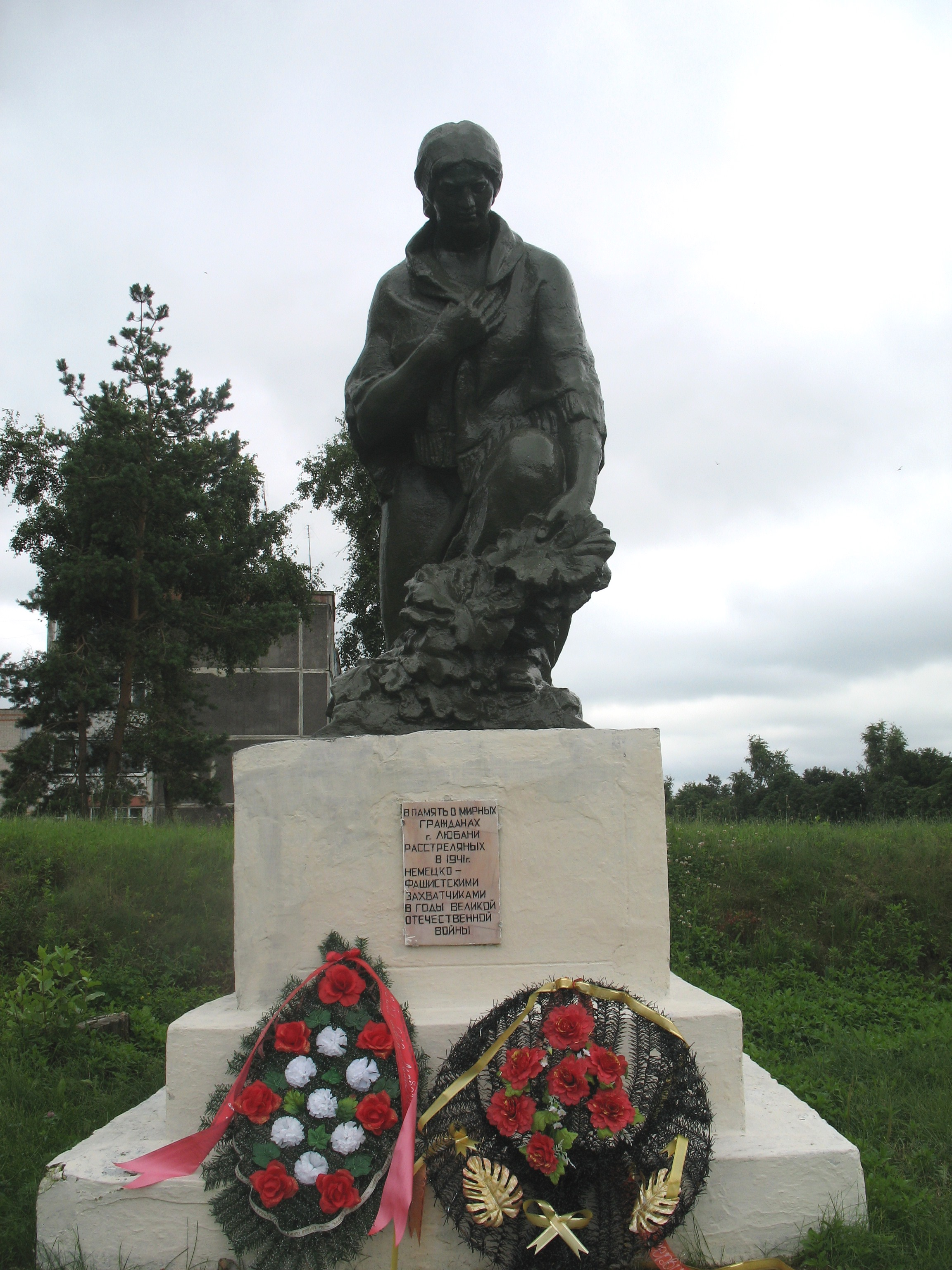 Памятник евреям в городе Любань (Любанский район Минской области), убитым нацистами в ноябре 1941 года.